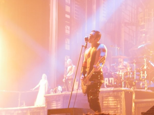 Richard Kruspe bij het concert in Arnhem (Gelredome) op 6 December 2009.